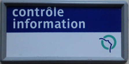 badge controle